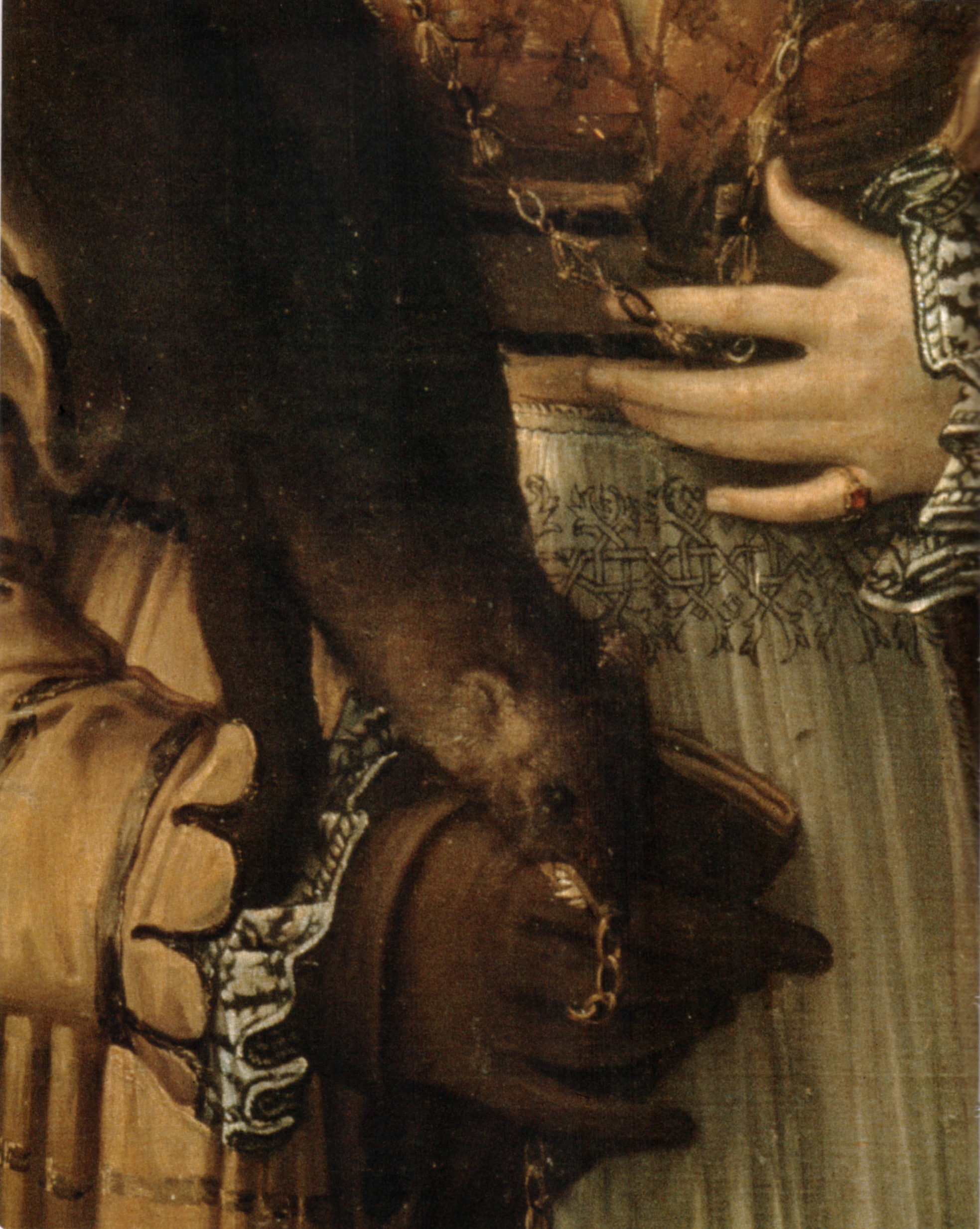 detail